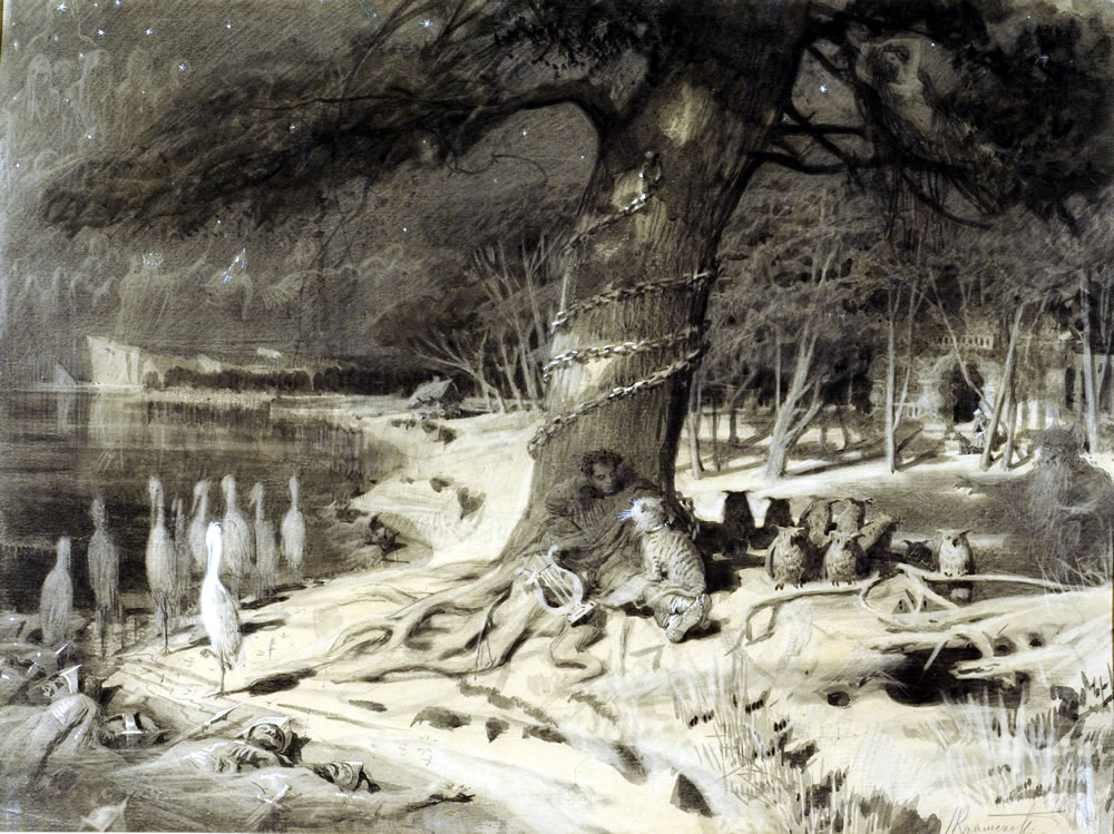 «Руслан и Людмила». Иллюстрация к «Прологу». И. Н. Крамской. 1879. Россия. Бумага, акварель, тушь, белила. 46,2 × 61,2. КП-2847. Всероссийский музей А. С. Пушкина. Из Государственной Третьяковской галереи в 1938 г.